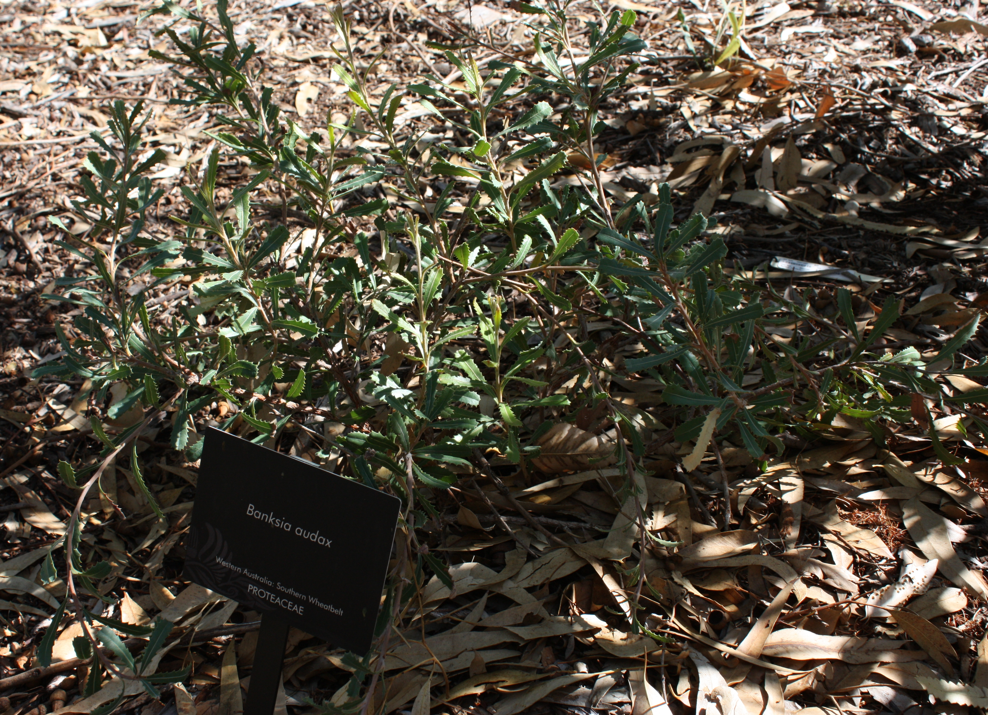 Banksia audax, Kings Park, Perth, Western Australia